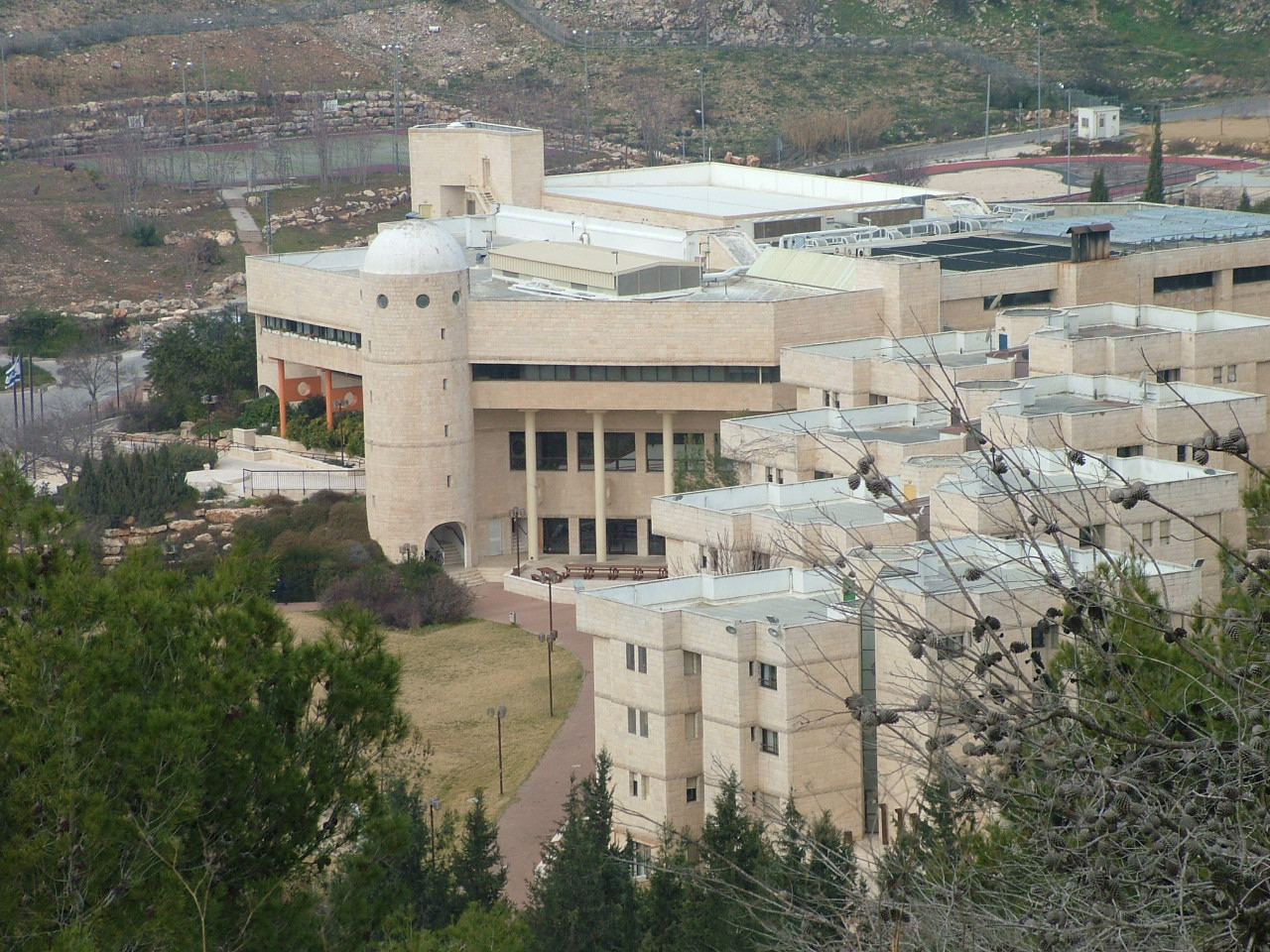 IASA school, Jerusalem, Israel